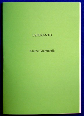 Malgranda Gramatiko pri Esperanto de Peter Weide (germana versio).